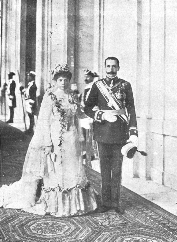 Los príncipes de Asturias al terminarse la ceremonia. Fotografía de Christian Franzen.